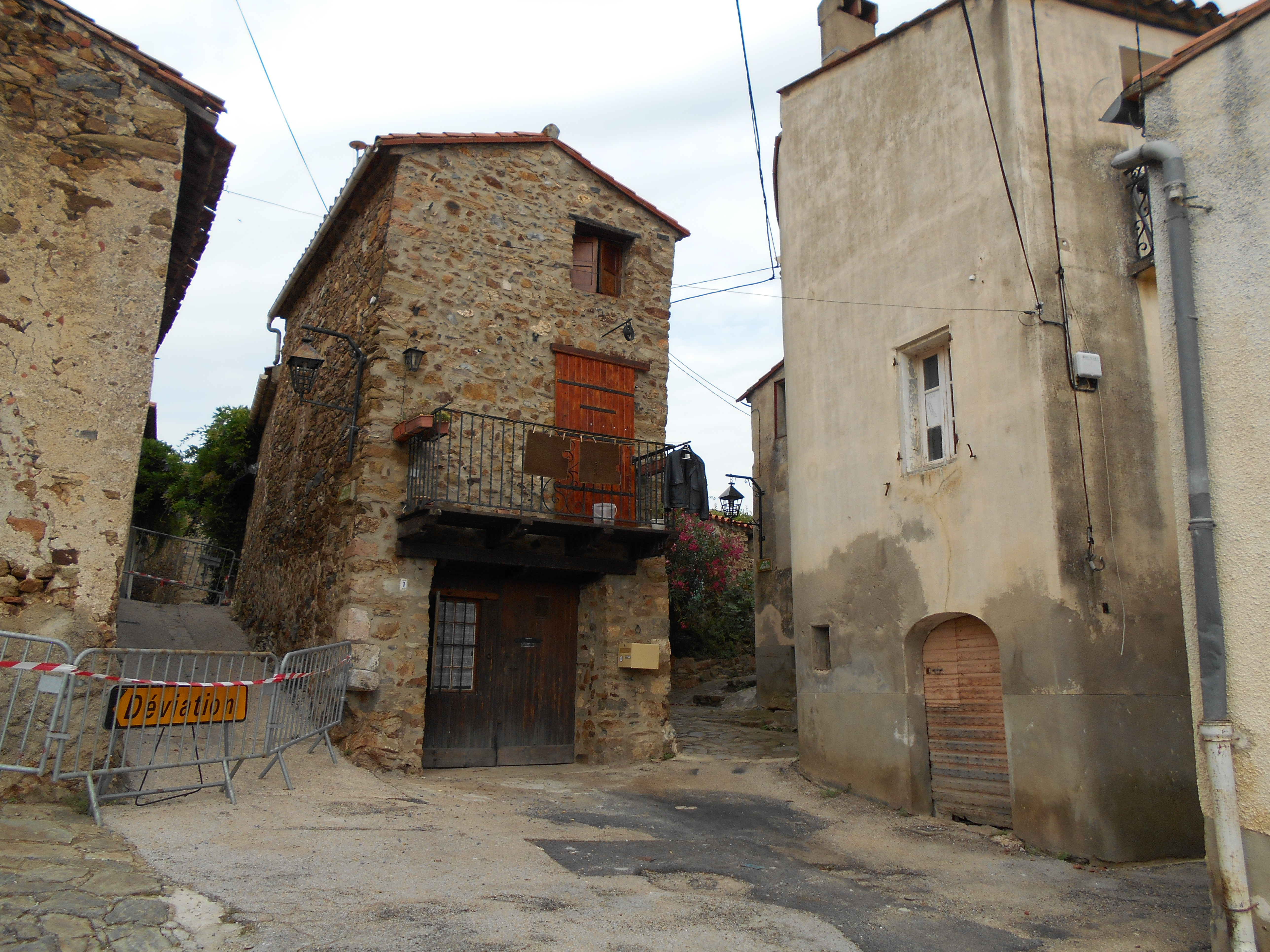 La cellera d'Oms